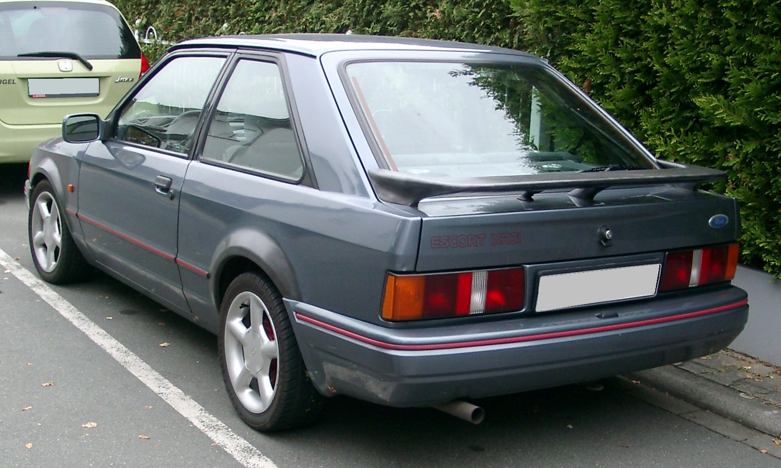 Ford Escort Mk4 (XR3i)